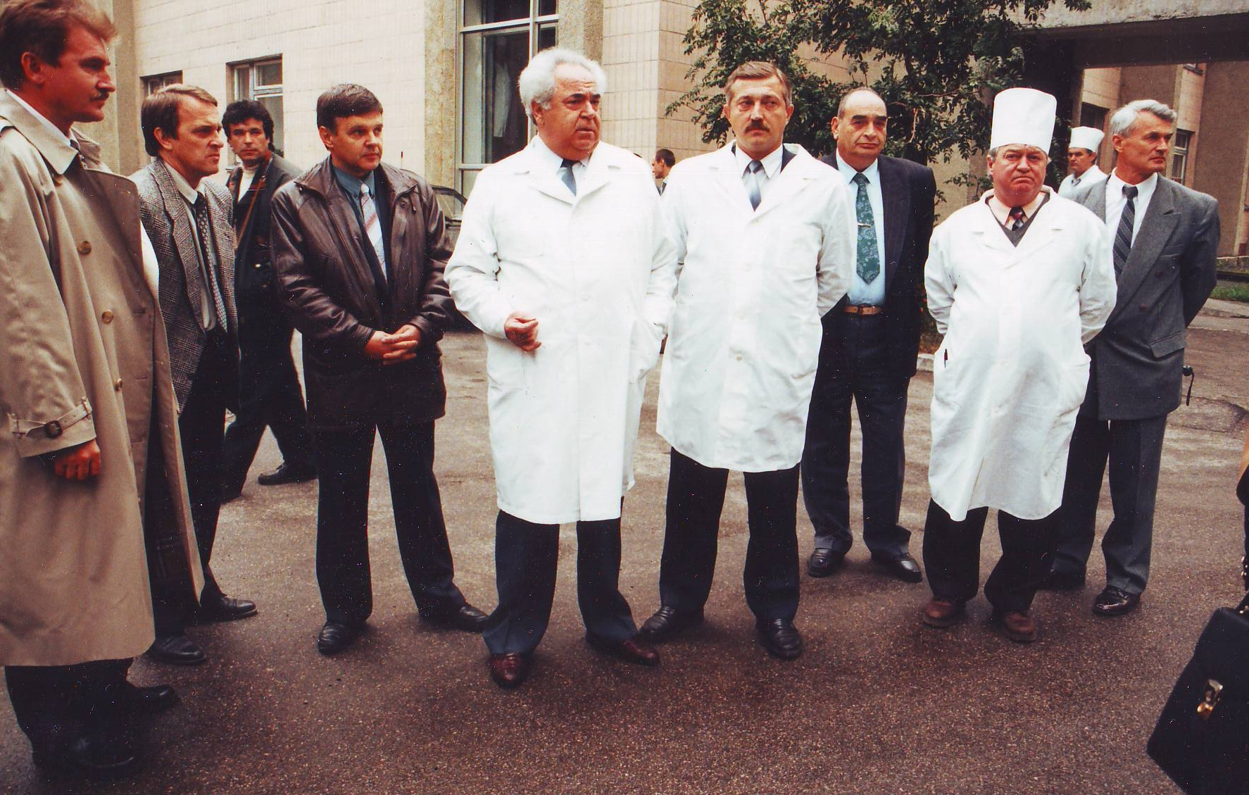 Фесун Анатолій Іванович проводить медраду у дворі лікарні